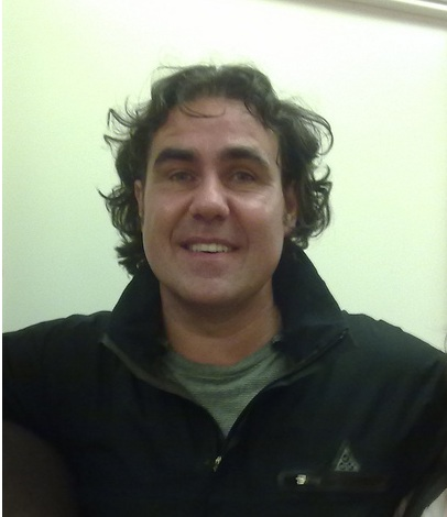 Micky Flanagan